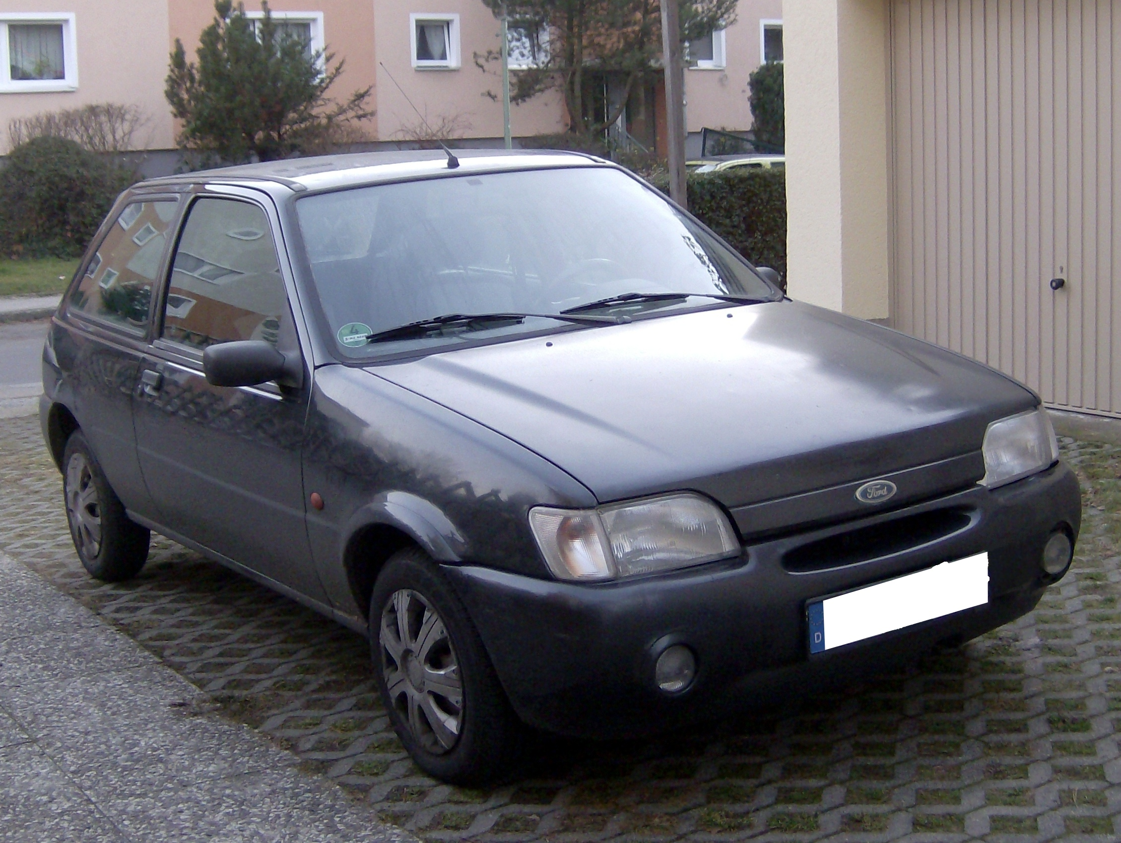 Ford Fiesta Future, MK3, GFJ